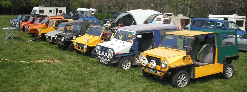 Monkies